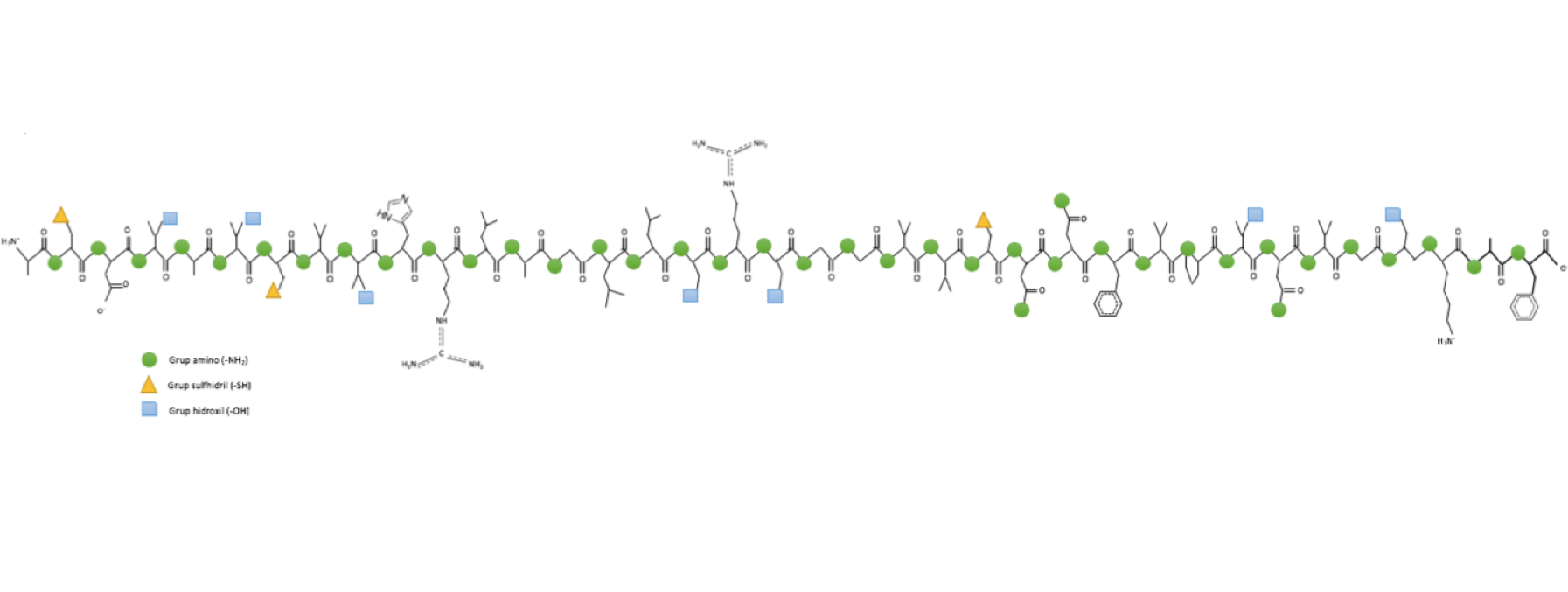 Sequüència dels aminoàcids que conformen el CGRP